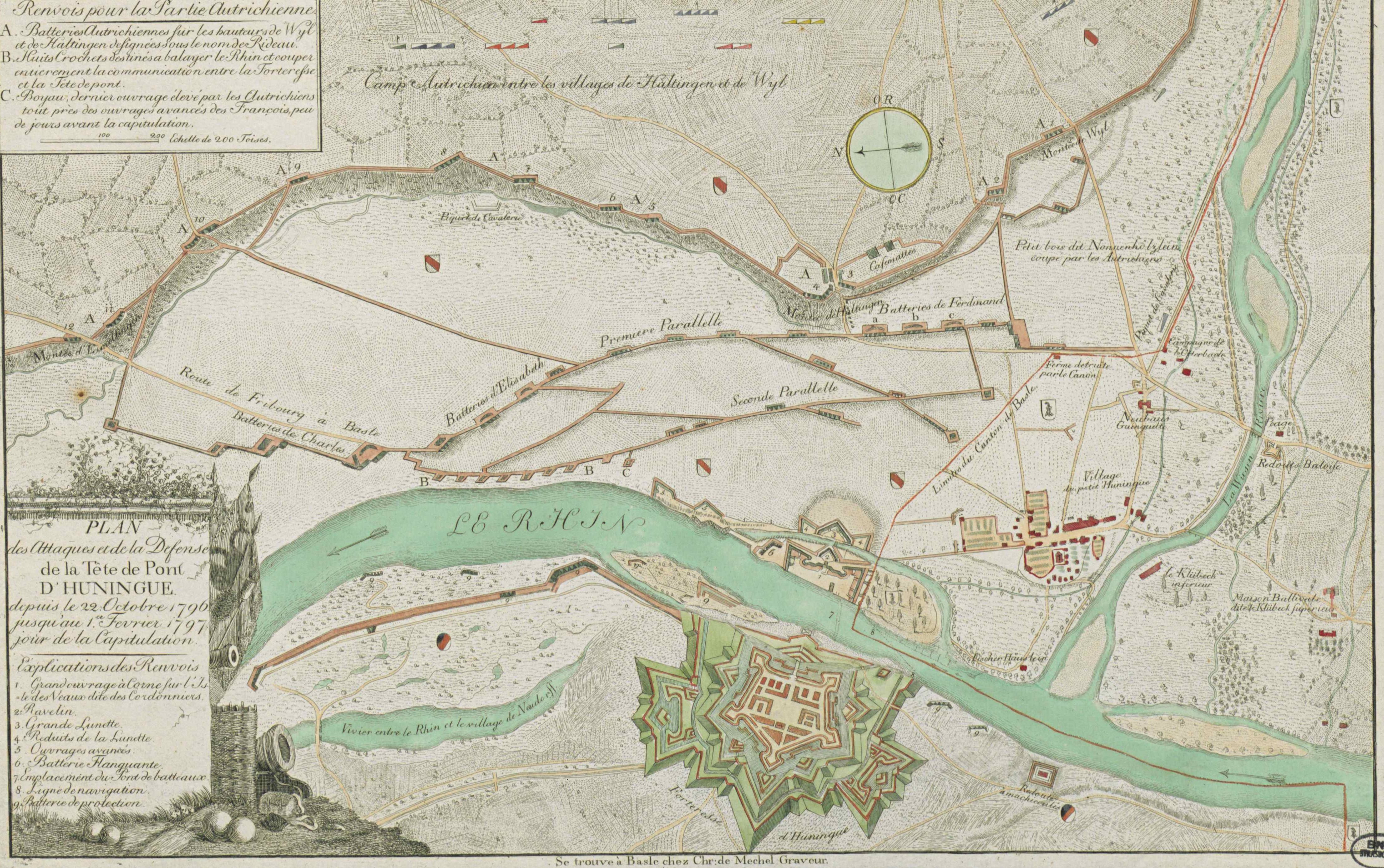 Plan der Belagerung des Brückenkopfs der französischen Festung Hüningen 1796-1797 durch kaiserliche Truppen. Nicht dargestellt ist die Schiffsbrücke zwischen der Festung und dem Brückenkopf über den Rhein, die bei Beginn der Kampfhandlungen durch Artillerie zerstört wurde. Originaltitel: Plan des attaques et de la défense de la tête de pont d'Huningue depuis le 22 octobre 1796 jusqu'au 1er février 1797, jour de la capitulation; levé et dessiné par Ch. Pinot... Huningue (1796-1797) de Chr. Mechel